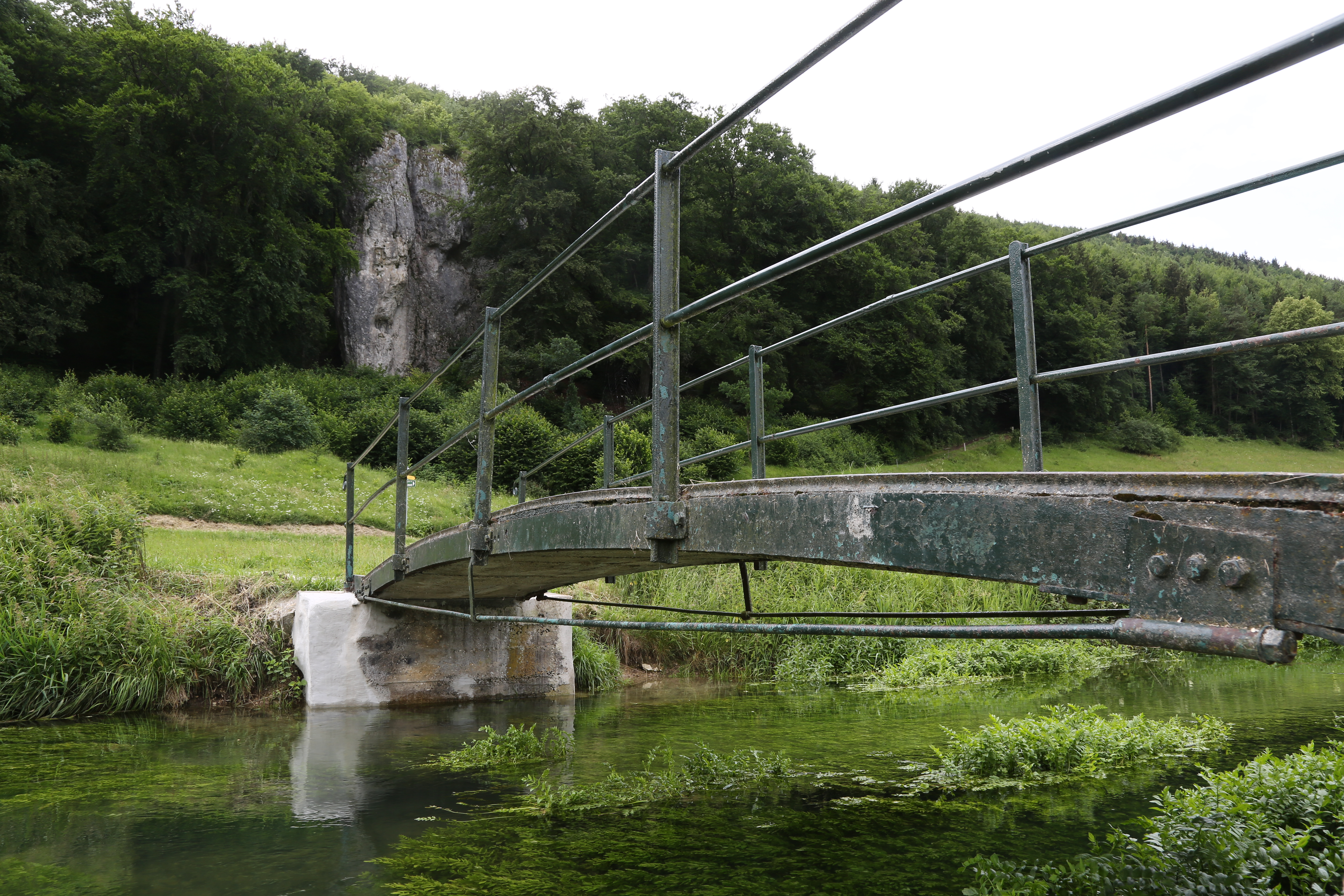 Achtal bei Schelklingen